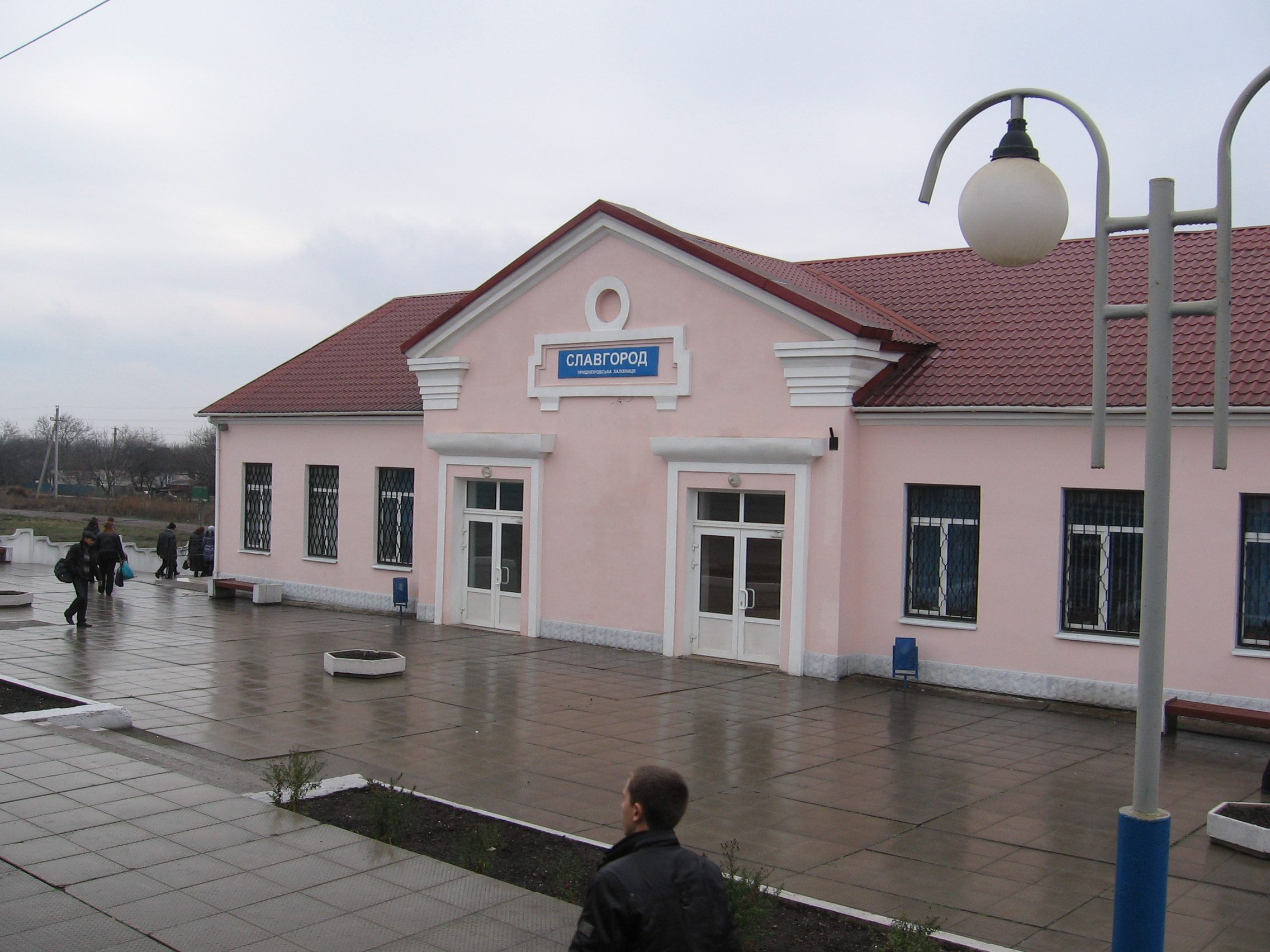 Вокзал ст. Славгород-Південний